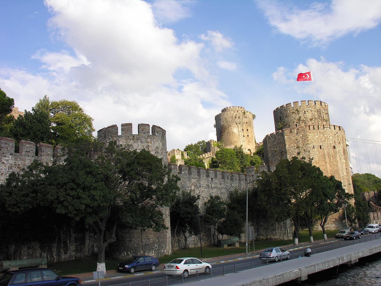 Rumeli Hisari Fortress, Bosphorus, Istanbul, Turkey